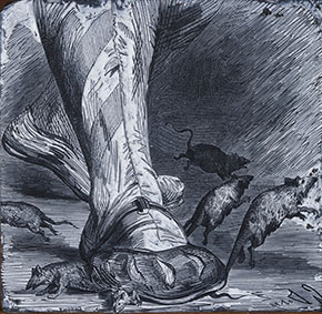 Bois gravé par Louis Dumont sur un dessin de Gustave Doré, pour le Prôsne du joyeux curé de Meudon, conte drôlatique de Balzac, vers 1860, collection mij